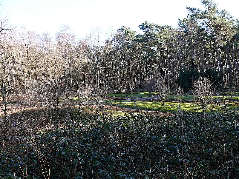 Coesfeld-Lette, Heidefriedhof, eigenes Bild